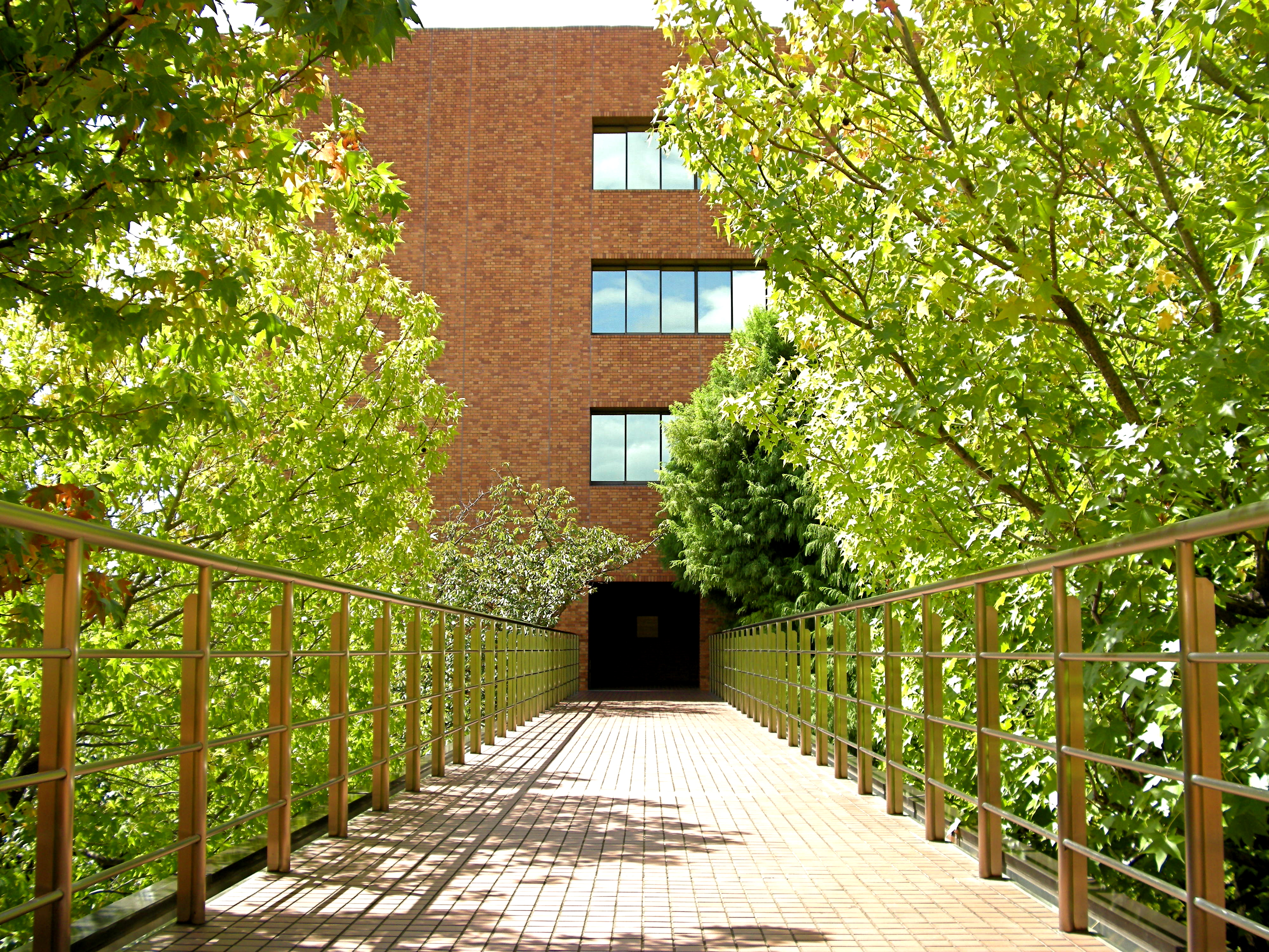 School Building at Osaka Gakuin University (Osaka, Japan)